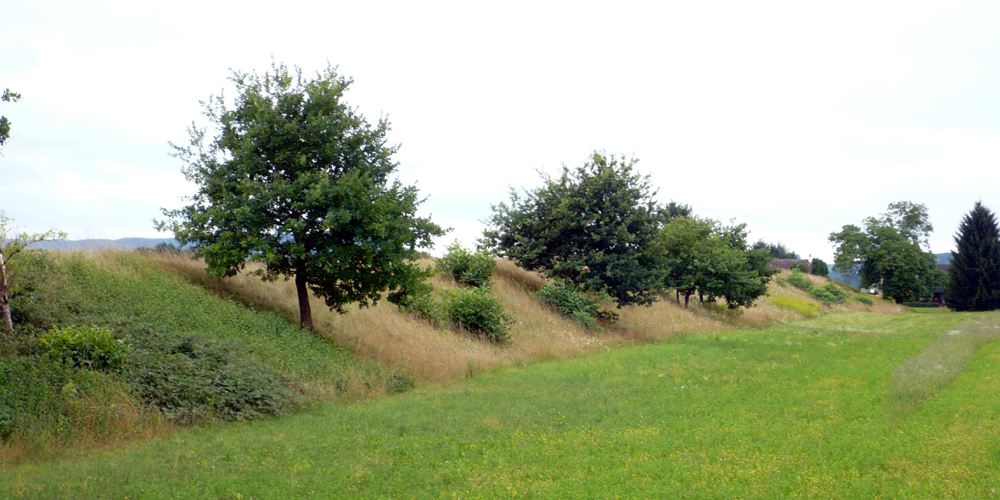 Keltenwall Schanz bei Altenburg, Gem. Jestetten, Baden-Württemberg